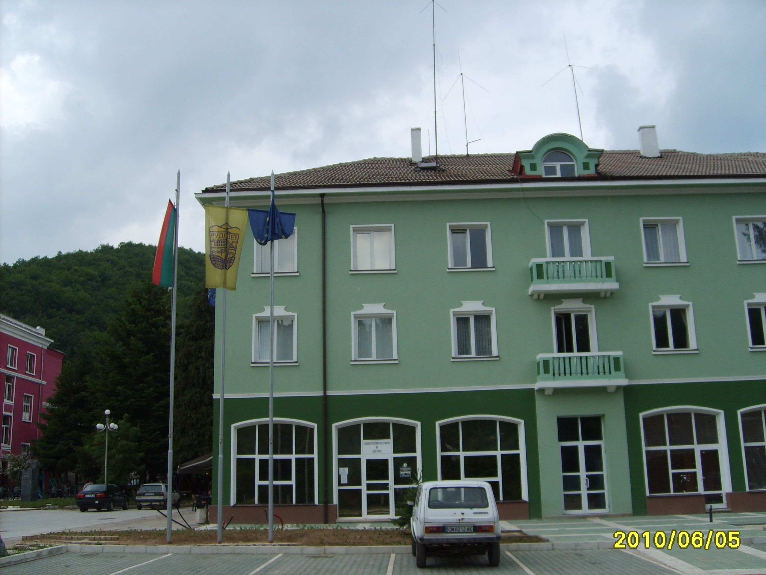 Кметството в Рудозем.